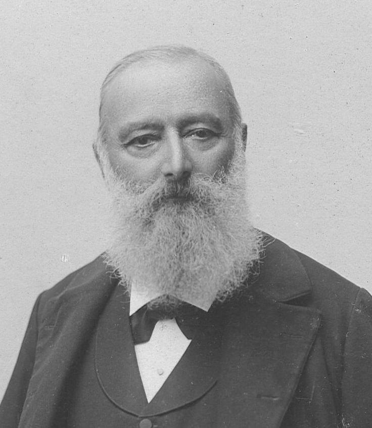 Ritratto di Antonio Tosi